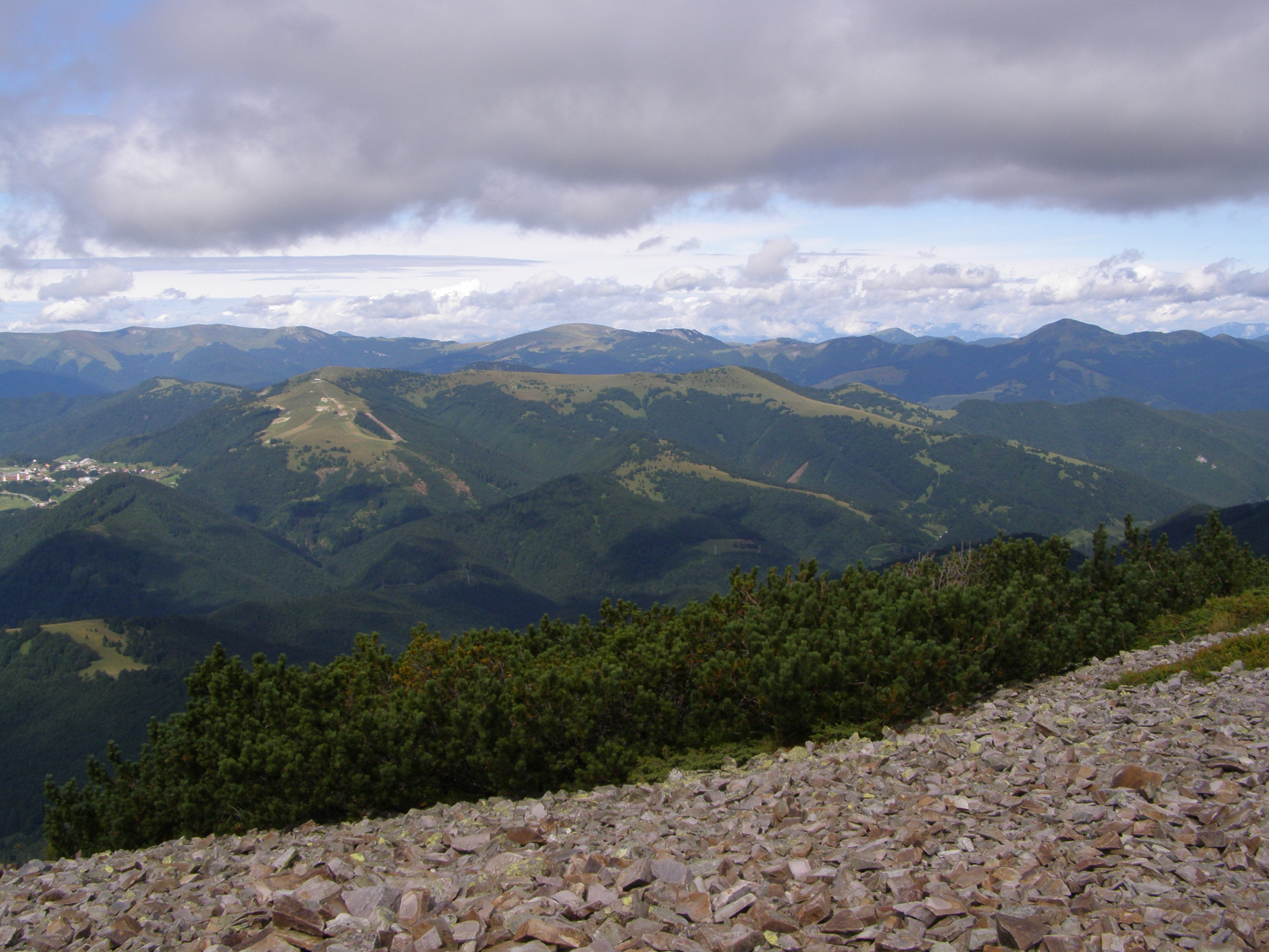 Nízké Tatry, Ďumbierské Tatry, pohled z úbočí vrcholu Prašivá (1652 m) na severozápazápad: uprostřed vlevo vrchol Zvolen (1403 m), vpravo Malý Zvolen (1372 m), v pozadí Velká Fatra (vlevo Ostredok, uprostřed Ploská, vpravo výrazný vrchol Rakytov)